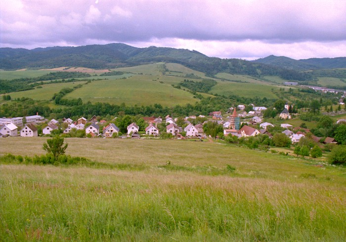 Richvald Village 2 (Slovakia)